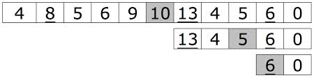 Srpskohrvatski / српскохрватски: 1D peak finding